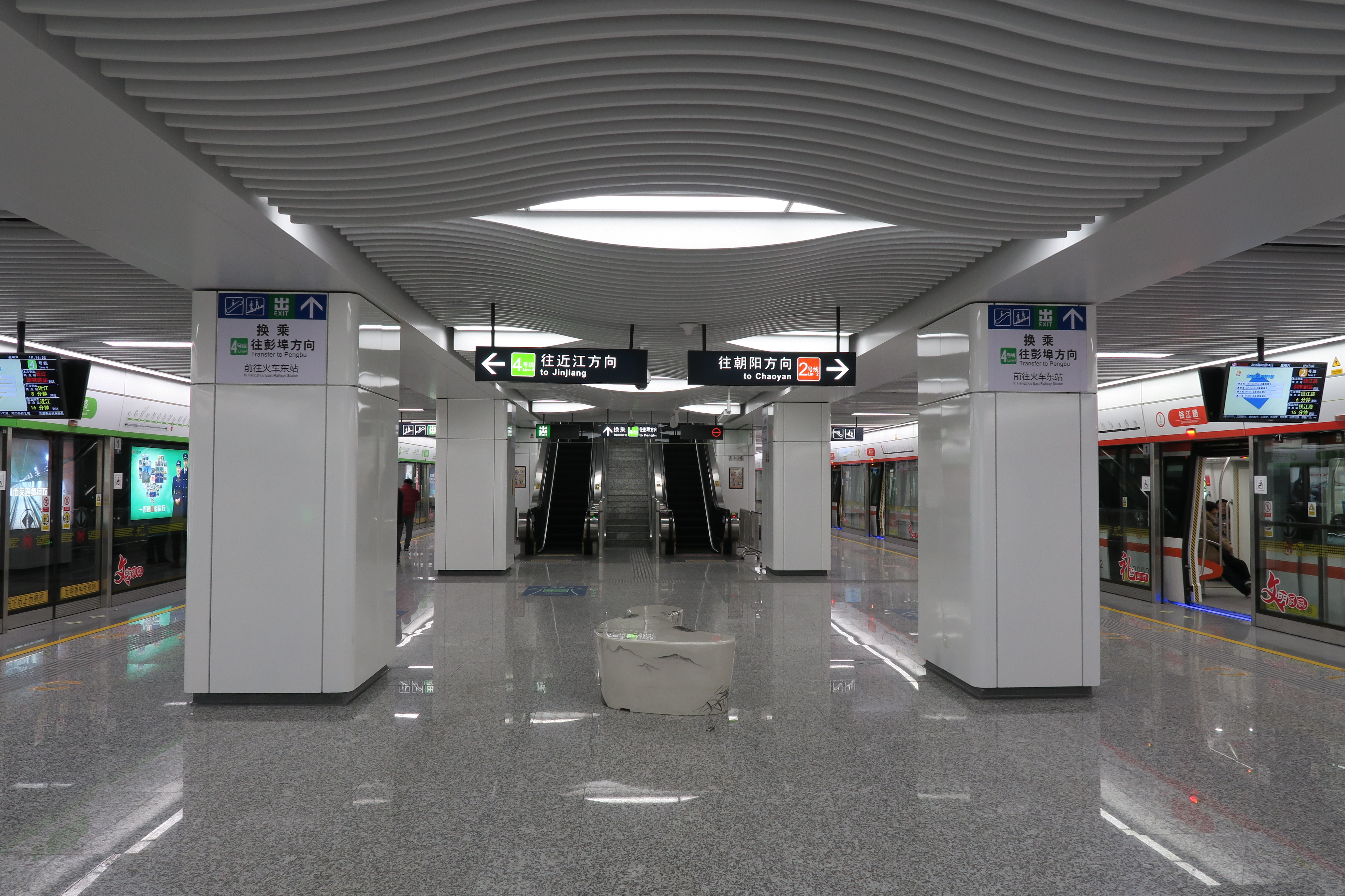 杭州地铁钱江路站